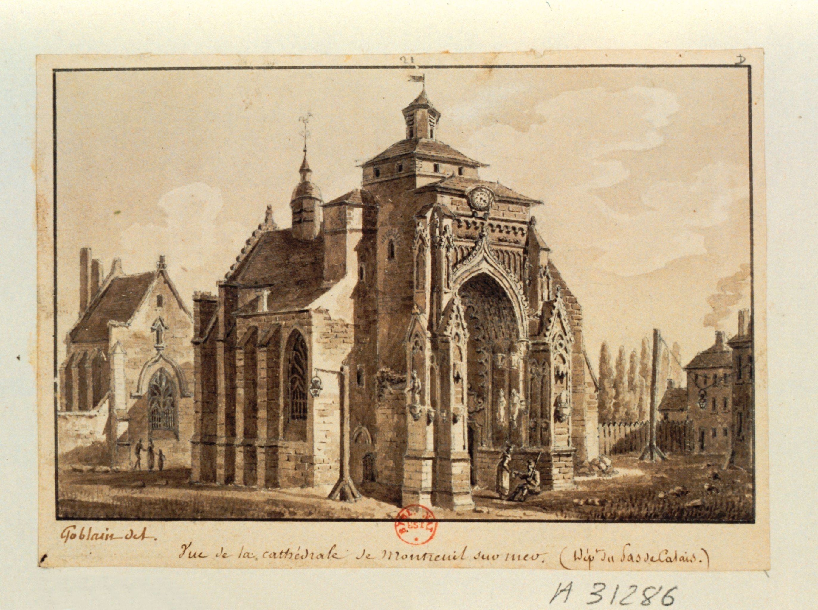 'Vue de la cathédrale de Montreuil sur mer (Dép.t du Pas de Calais) - Abbatiale Saint-Saulve. Dessin à la plume et lavis à l'encre brune, 9,5 x 14,7 cm. Gravé par Baugean dans le "Nouveau voyage pittoresque de France", Paris, Osterwald l'aîné, 1817.